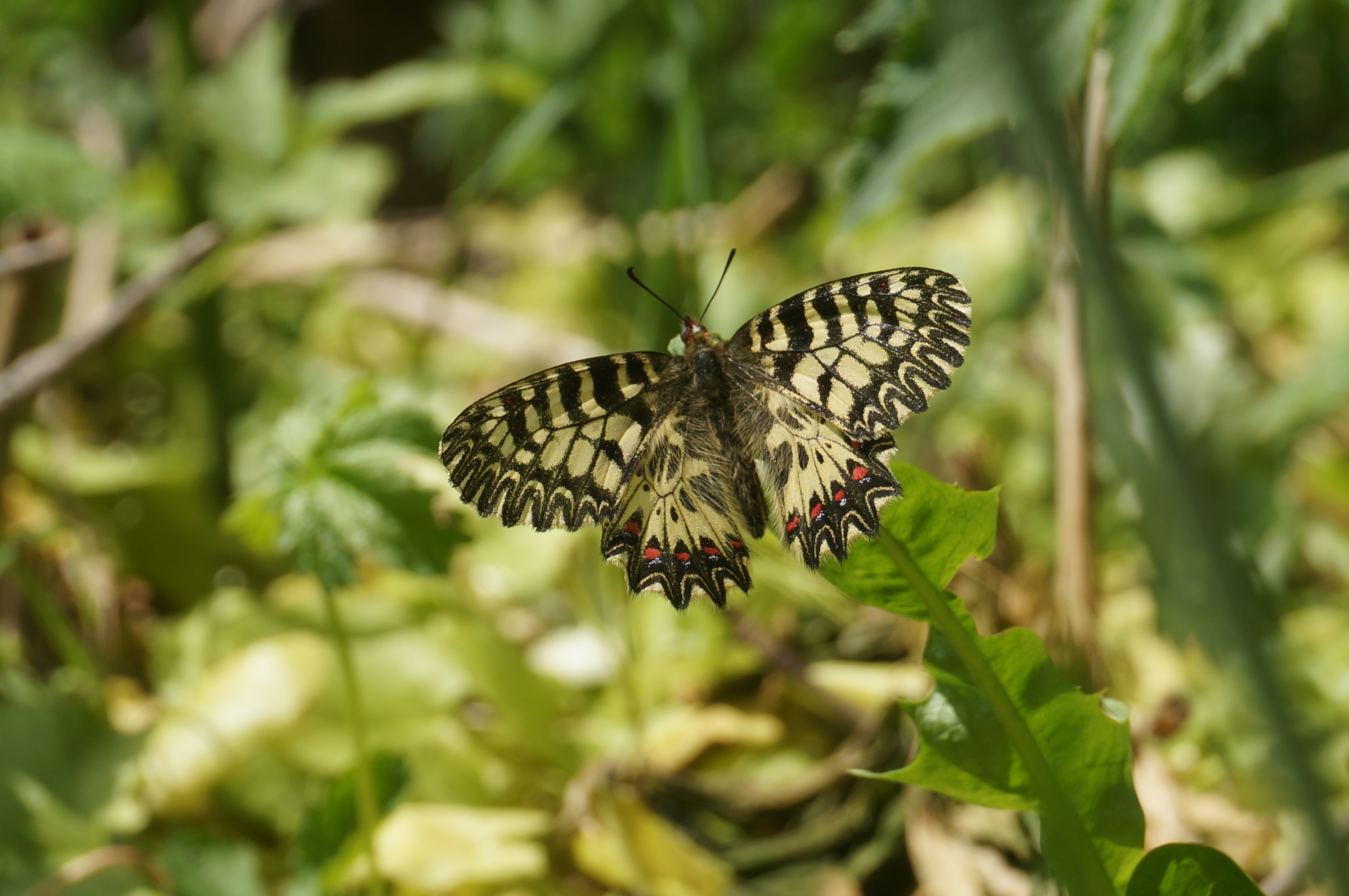 Codru, monument al naturii amplasat în raionul Strășeni, satul Lozova (cod MD-ST-rs-001)